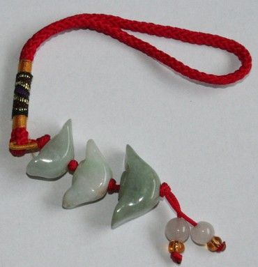 Chinesches Yoan Bao